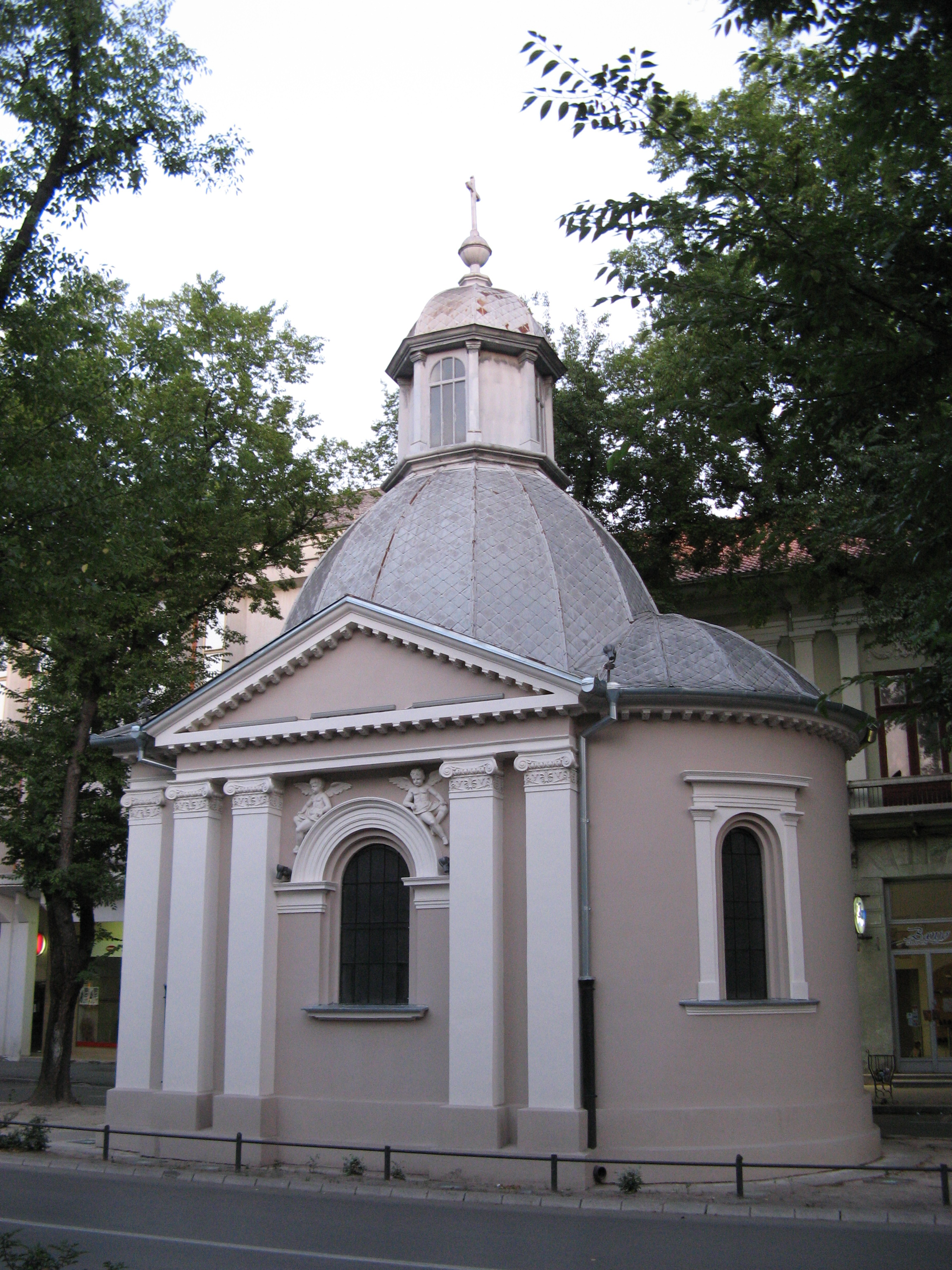 Капелу су подигли Суботичани 1738. године у знак сећања на жртве епидемије куге. Реконструисана је у стилу еклектике 1884. године по пројекту Титуса Мачковића, суботичког архитекте.